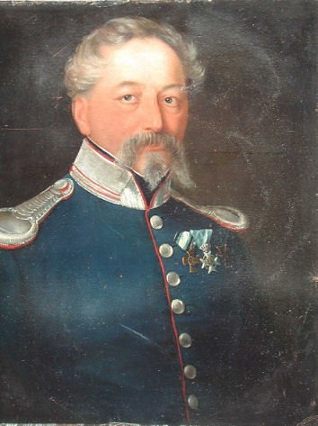 Franz Xaver von Predl, Bayerischer Offizier (1795-1866), Bruder der Malerin Katharina von Predl.